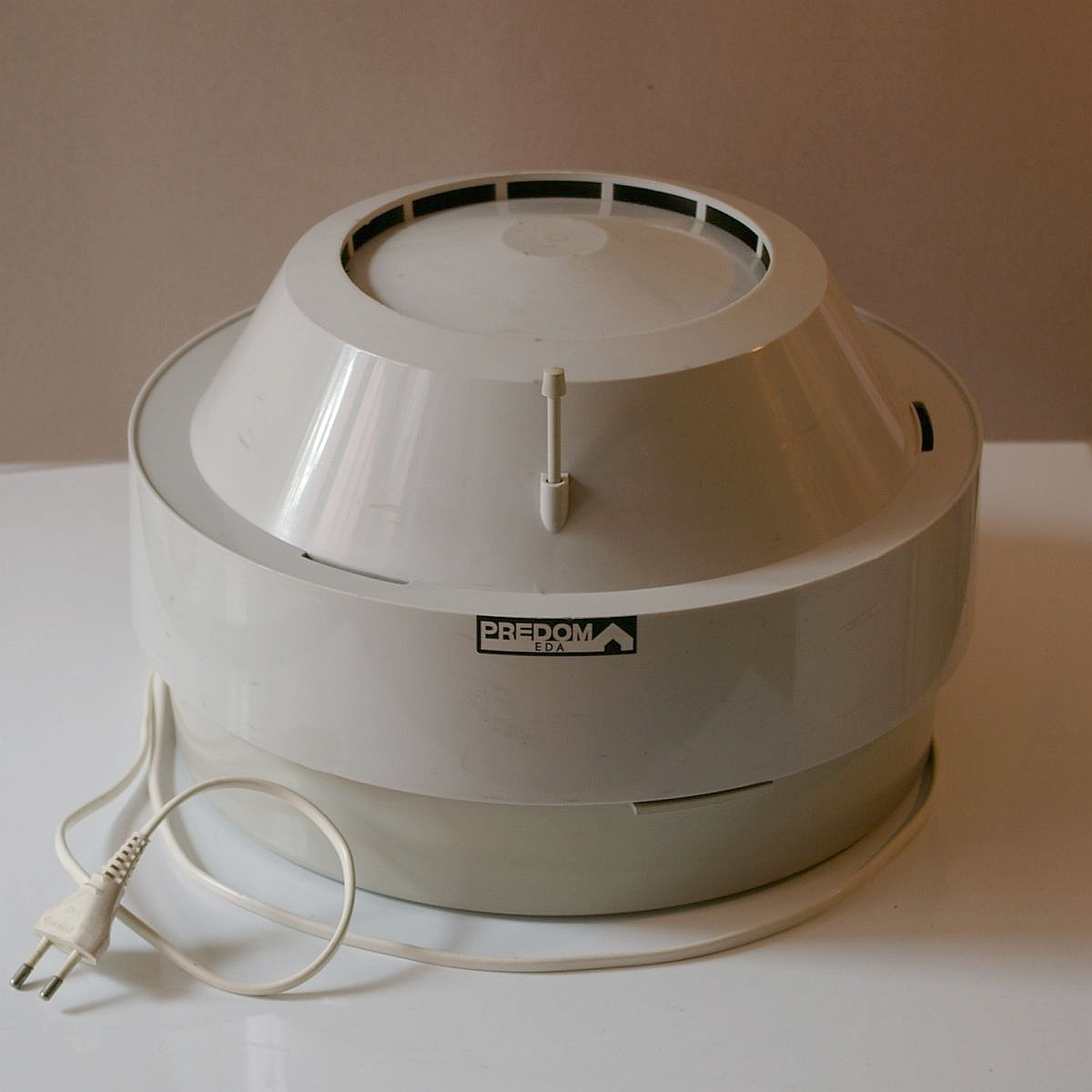 Polish humidifer NW-5 (1977) Polnischer Luftbefeuchter NW-5 (1977) Polski nawilżacz powietrza NW-5 (1977)